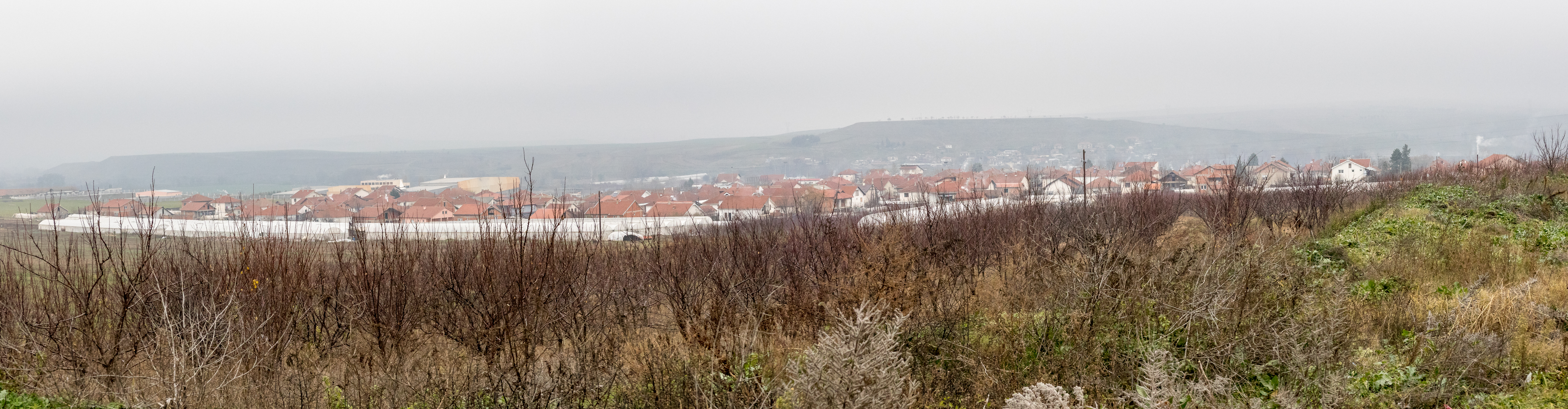 Фотографии од експедицијата во Градско